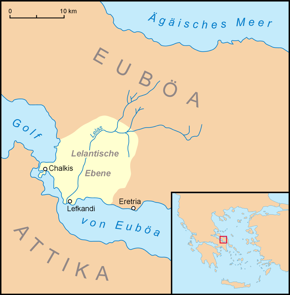 Der Lelantische Krieg